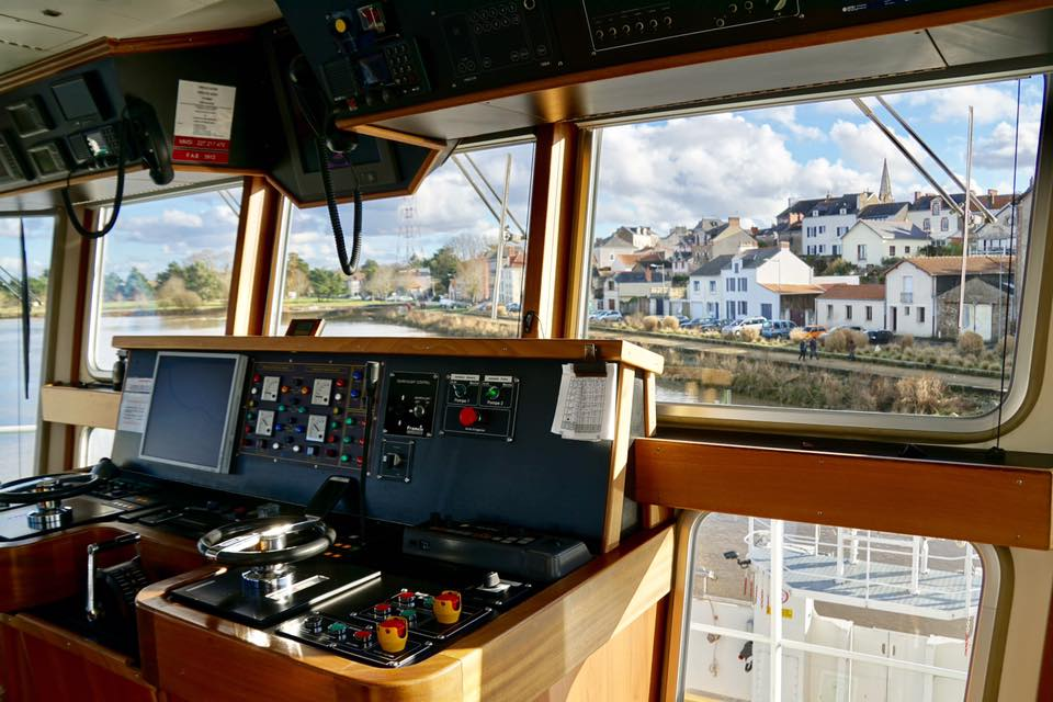 Photo du bourg du Pellerin, vu de la cabine de pilotage du Bac, traversant la Loire